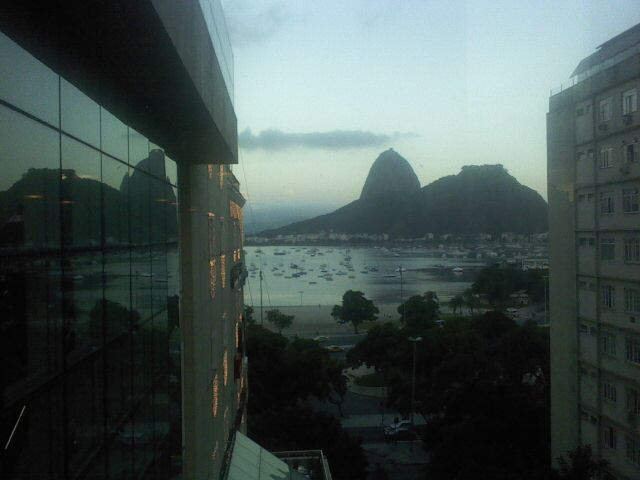 Enseada de Botafogo e Pão de Açúcar vistos a partir do Botafogo Escada Shopping